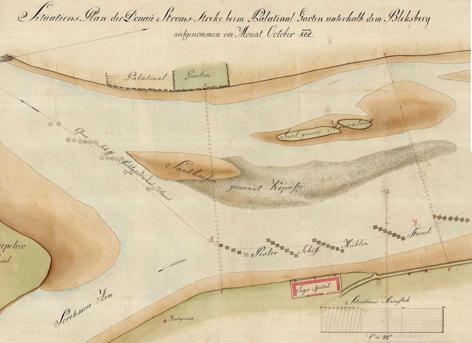 A budai /Pest m./ Nádor-kert melletti Duna-szakasz vízrajzi térképe, Kopaszi- és Nyúlfutási (Hasenlauf) zátonyok, malomtérkép. Vízrajzi térkép, malomtérkép